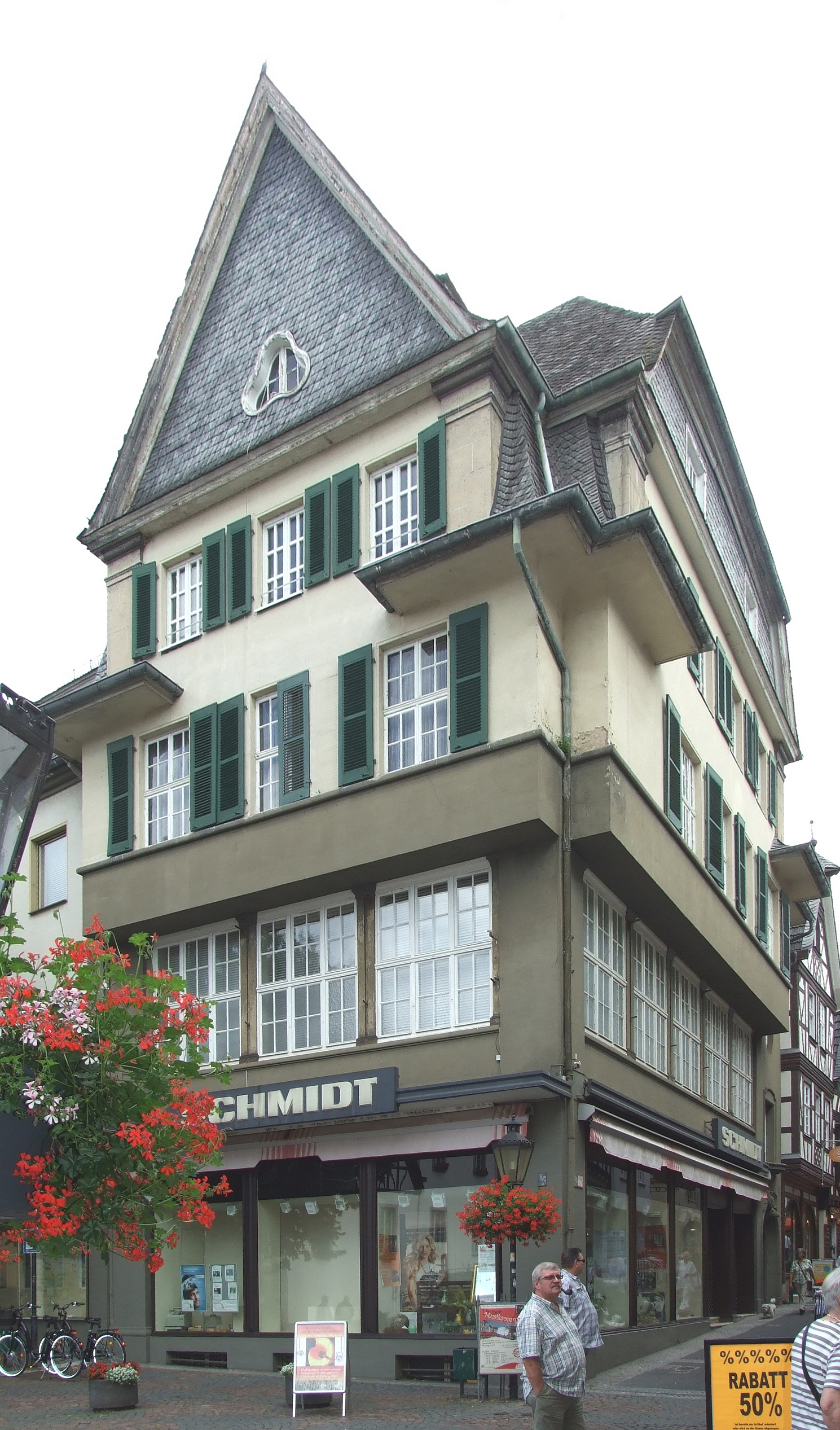 Denkmalgeschütztes Wohn- und Geschäftshaus, Rheinstraße 1 Ecke Burgplatz, Linz am Rhein